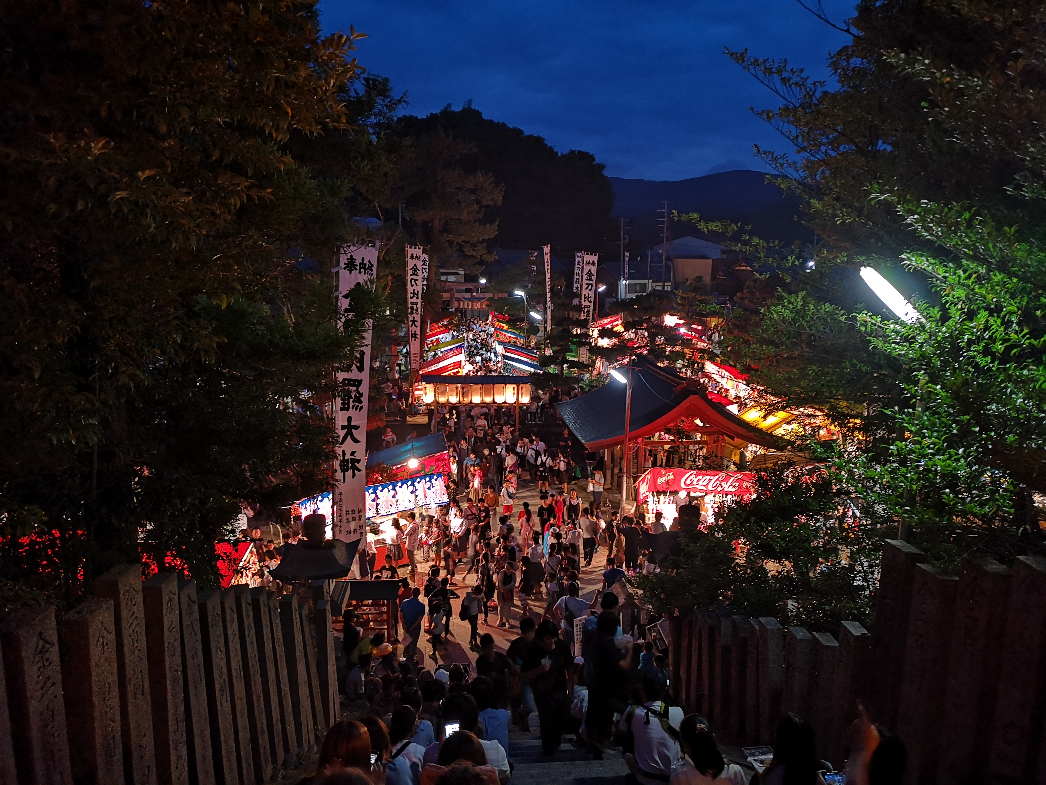 京都府京丹後市峰山の金刀比羅神社、夏の大祭当日。境内は様々な屋台と人で埋まる。